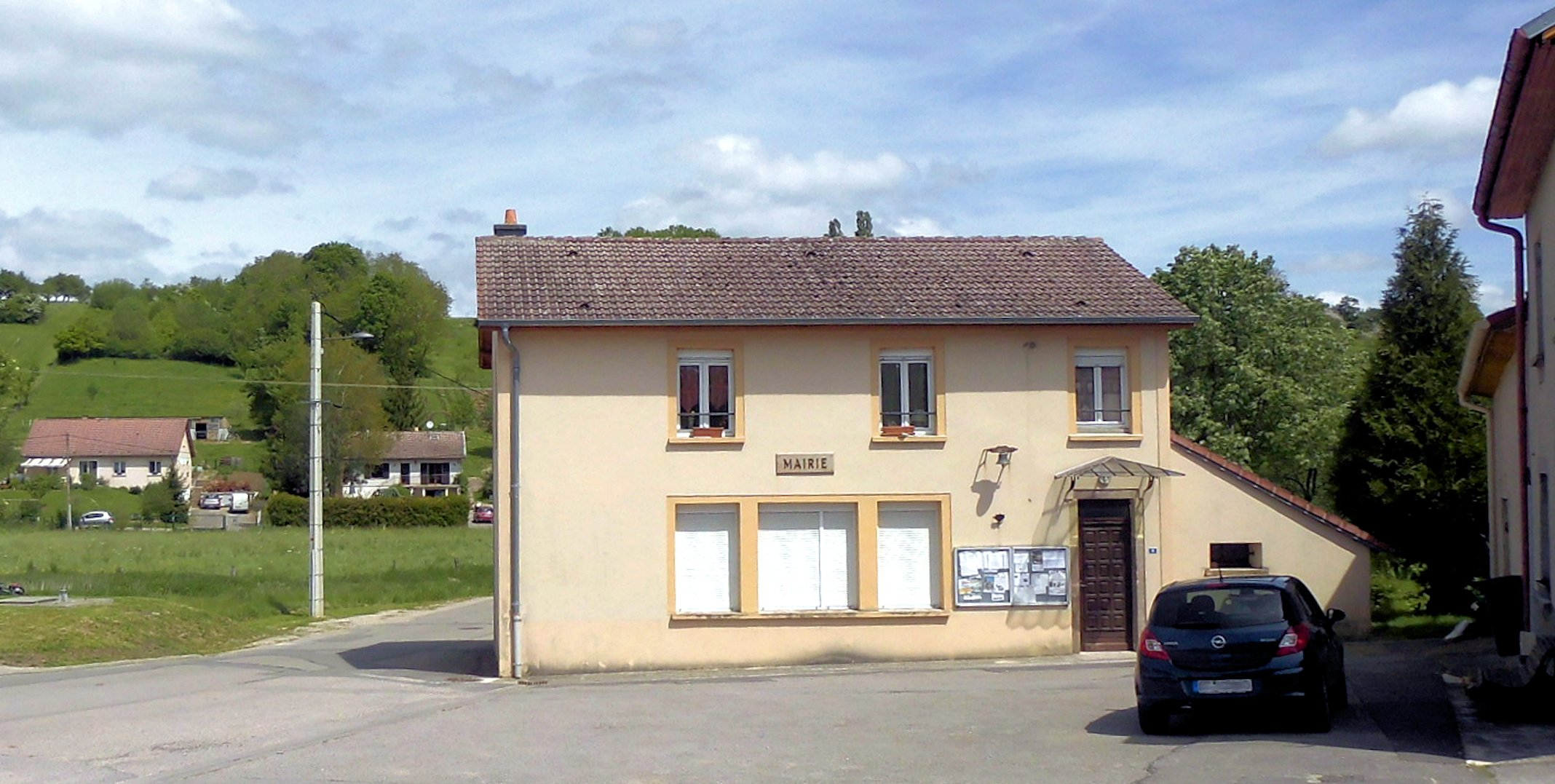 La mairie de Ramecourt